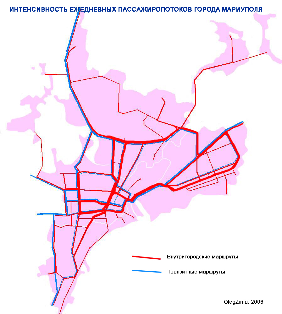 map